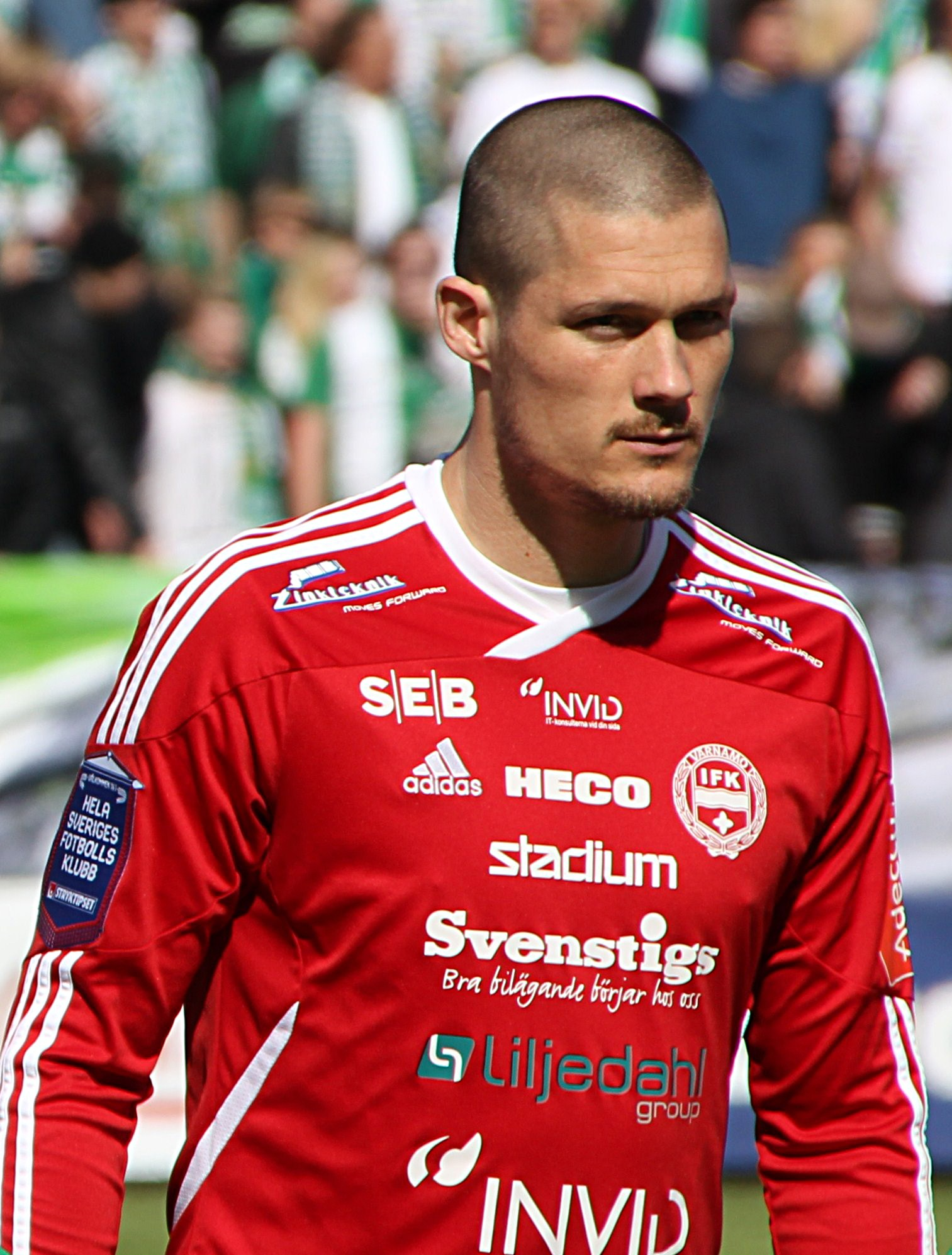 IFK Värnamos Pär Cederqvist.